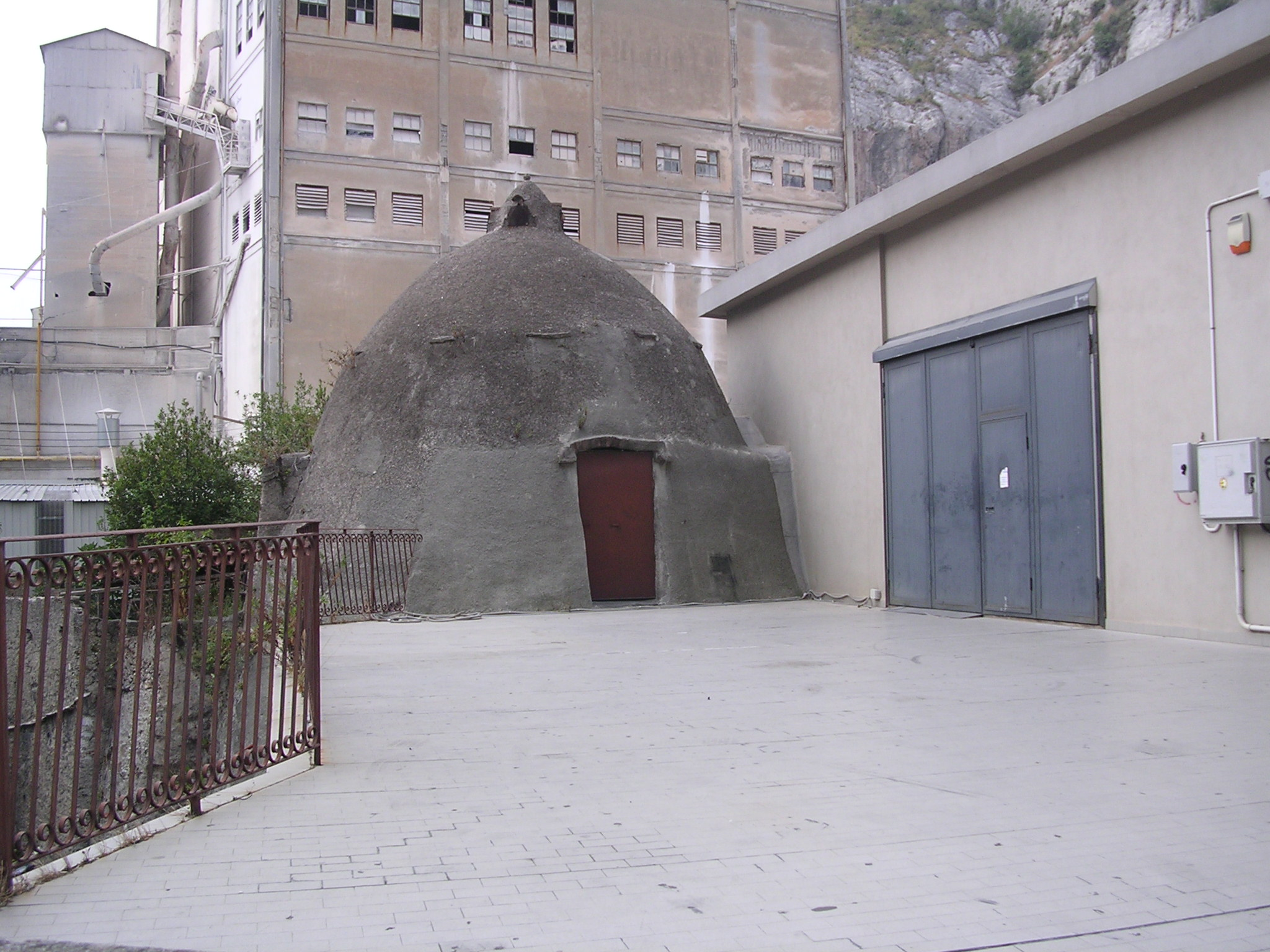 Vecchia fornace sulle pendici del monte Gazzo